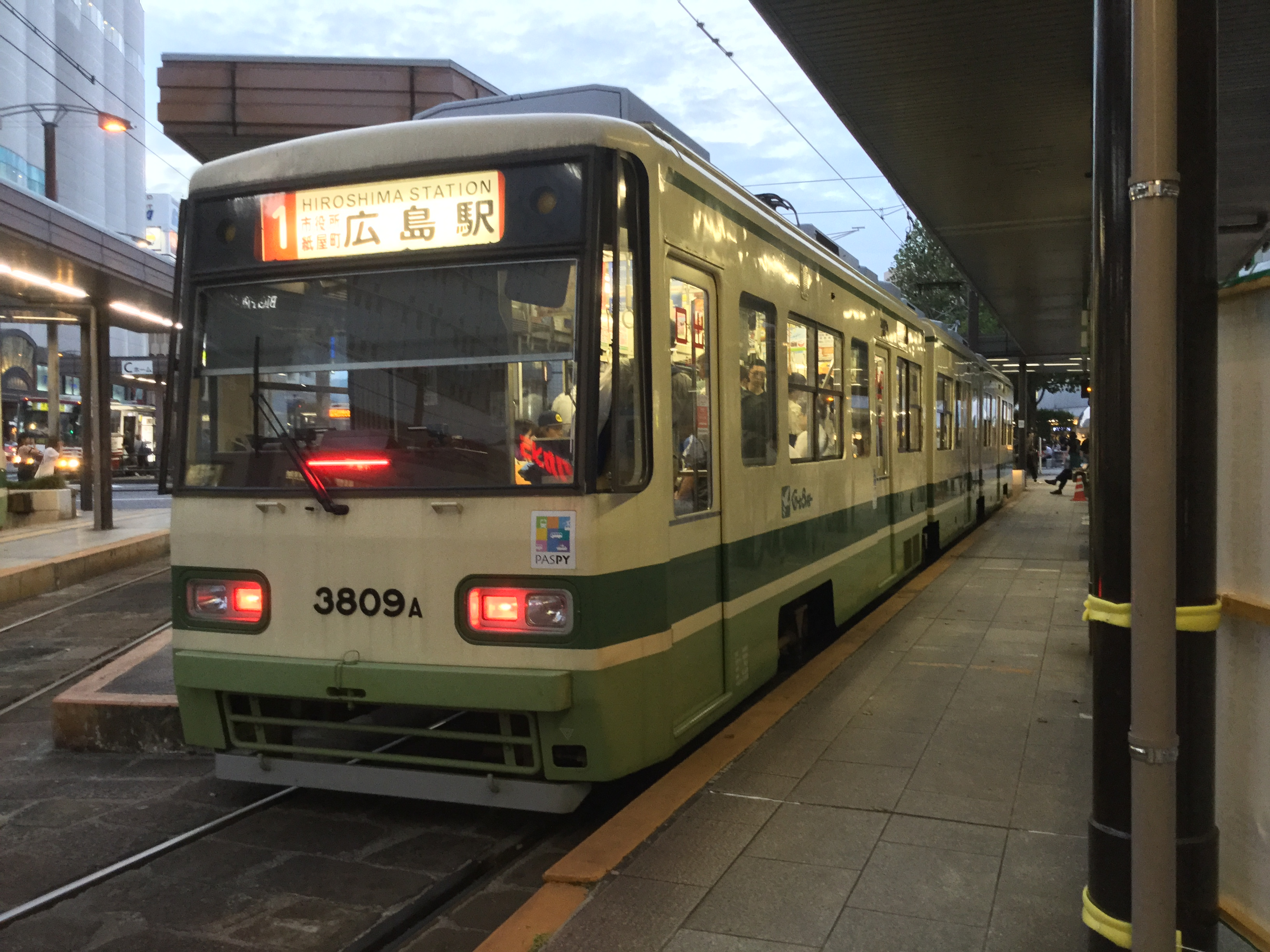 千田車庫に転属した3809号